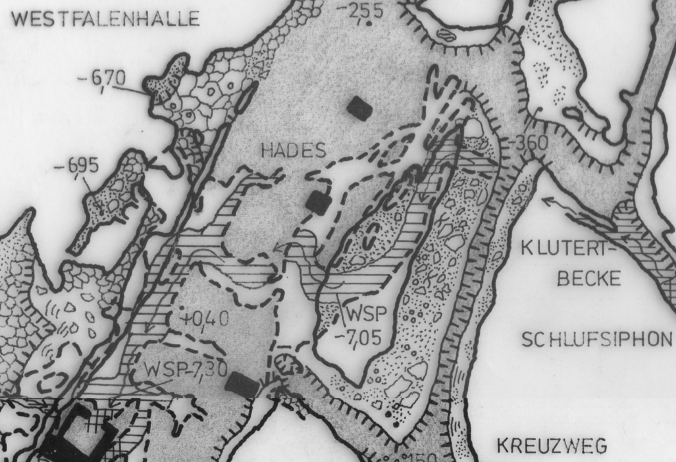 Ausschnitt aus einem handgezeicheten Höhlenplan der Bismarckhöhle in Ennepetal. Basierend auf Daten des Arbeitskreis Kluterthöhle.